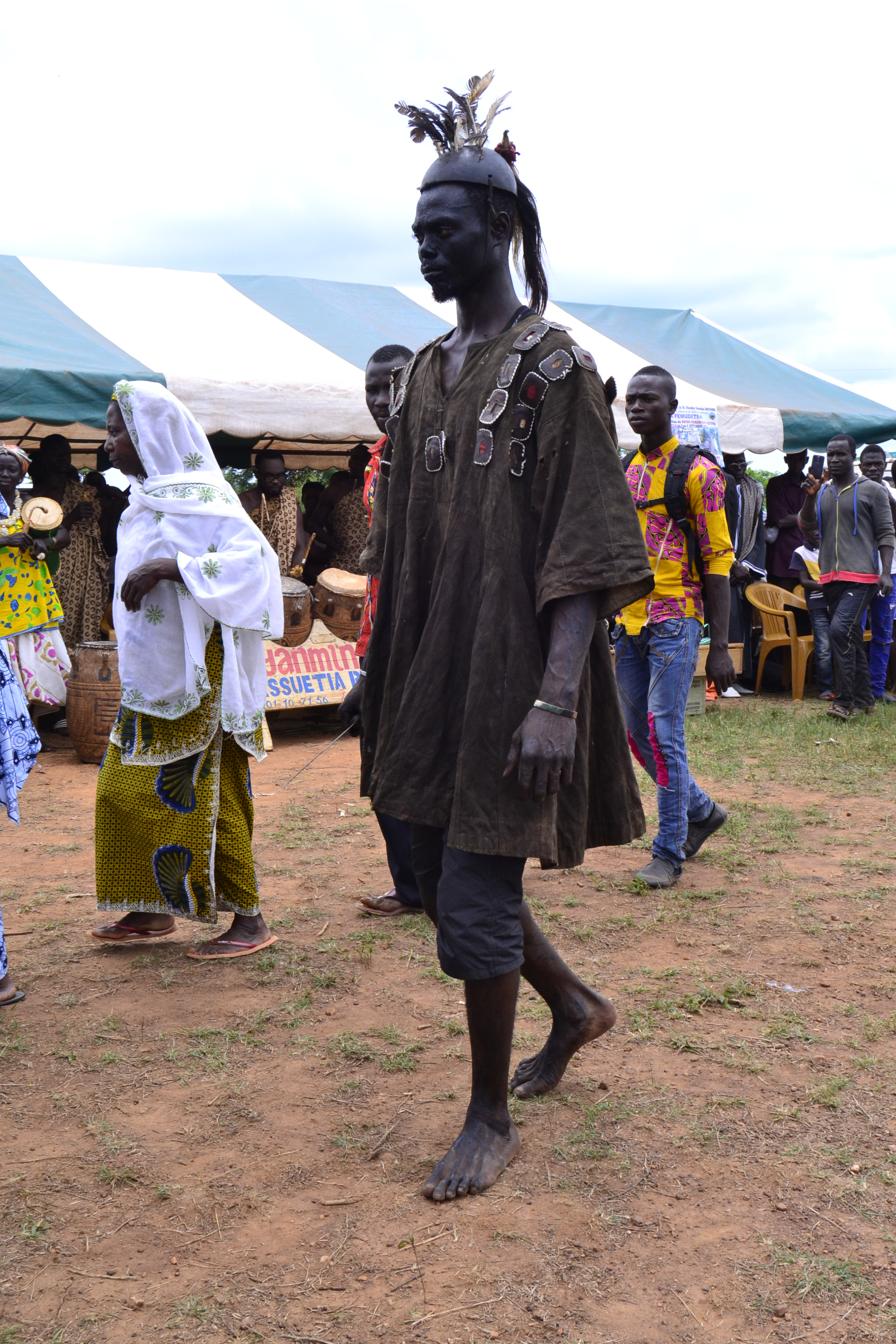 L'accoutrement d'un guerrier Abron